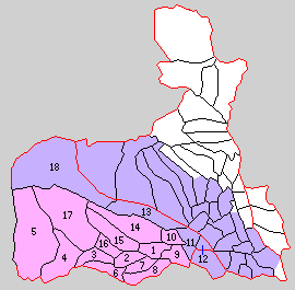 群馬県碓氷郡の町村。